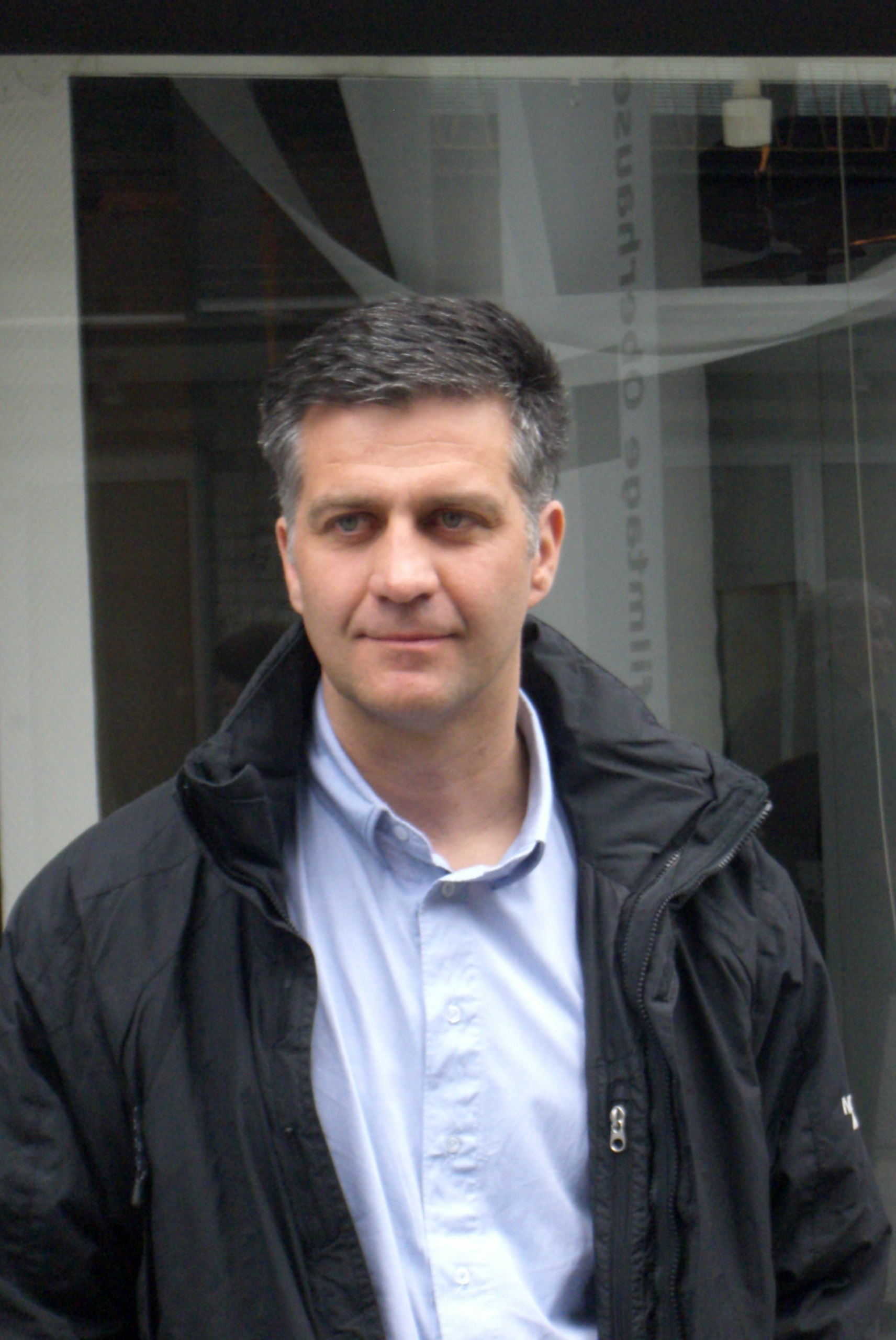 Der Regisseur und Drehbuchautor Romuald Karmakar bei den Internationalen Kurzfilmtagen Oberhausen 2009.